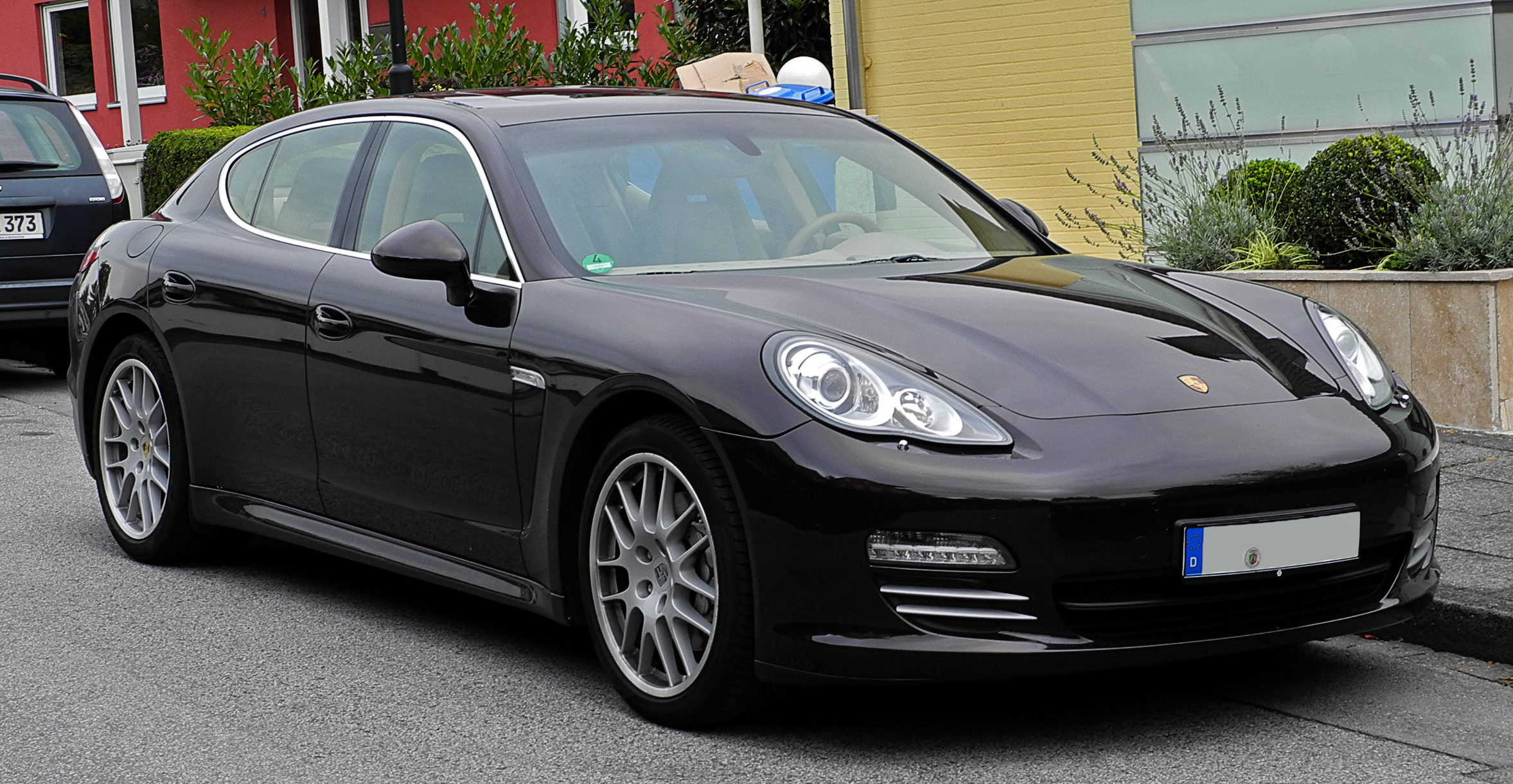 Porsche Panamera 4S (970)